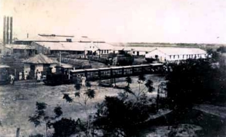 Vista del ferrocarril de Las Palmas